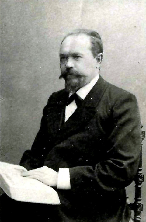 Халанский, Михаил Георгиевич